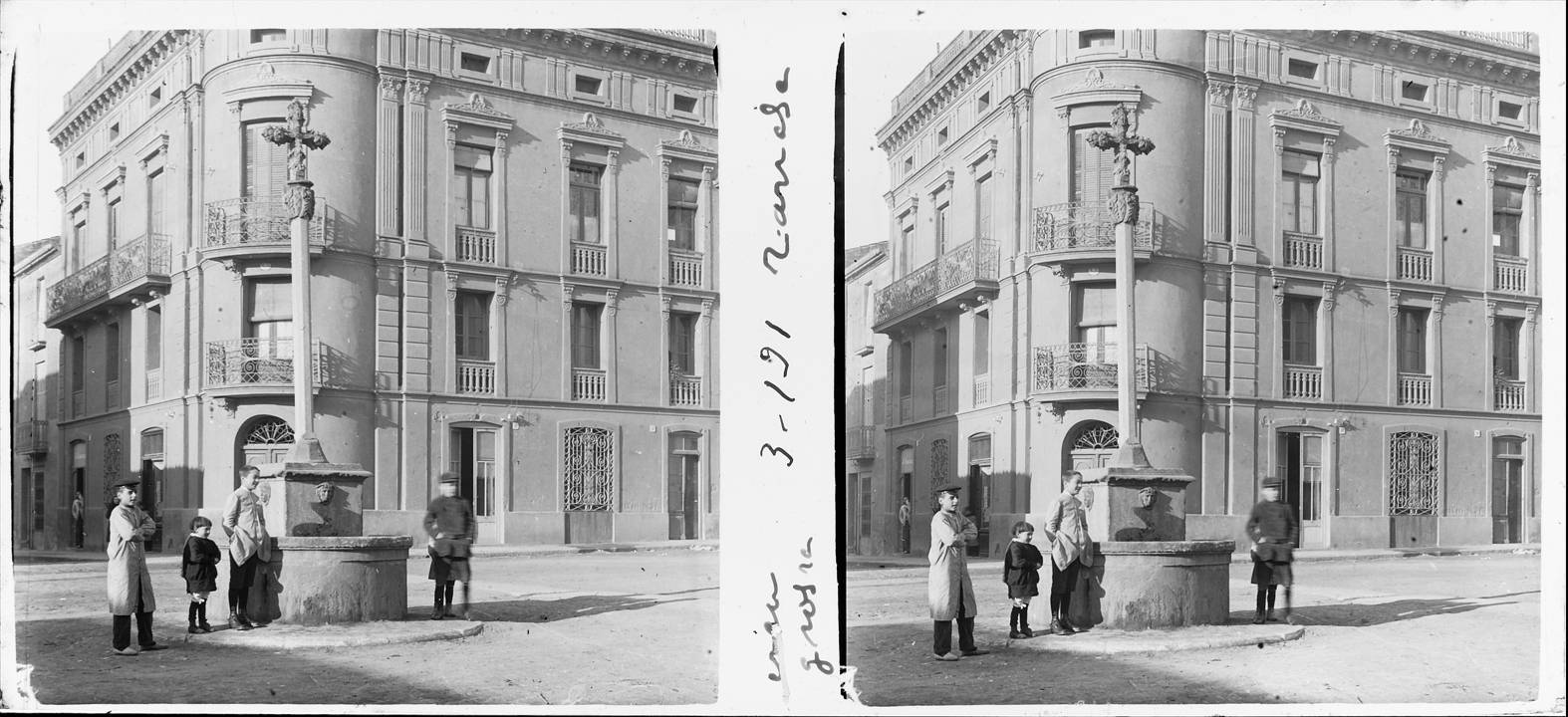 Anvers de la creu grossa a Terrassa. Josep Salvany i Blanch (1915)